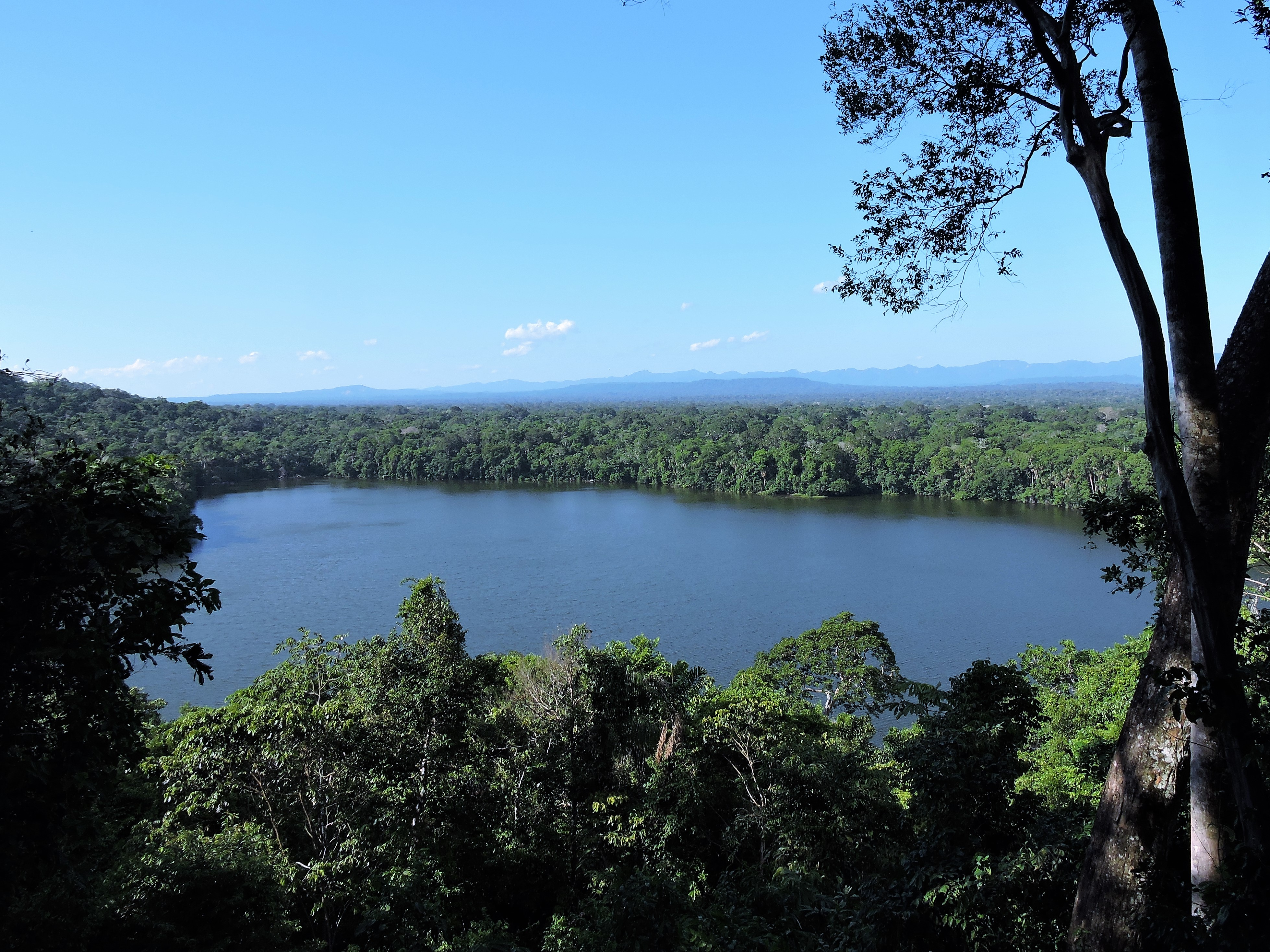 Vista de la Laguna Chalalan